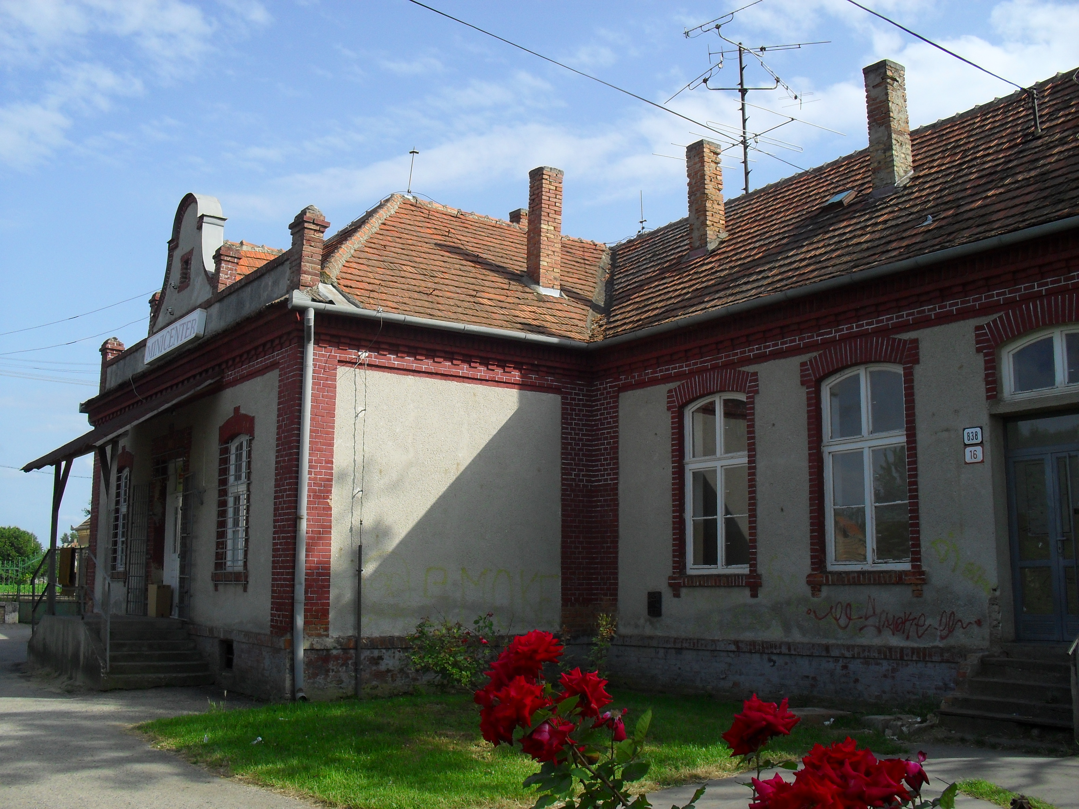 Perbete